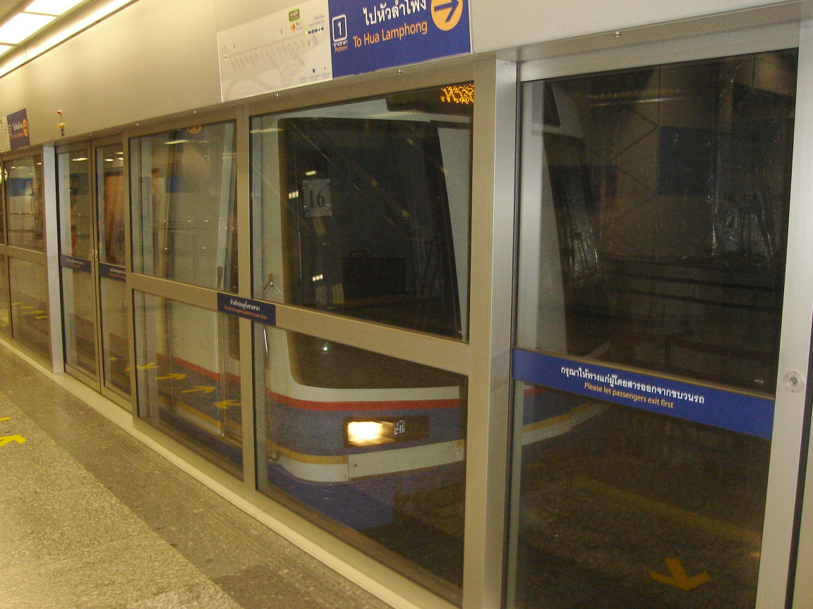 Bangkok Metro SiLom Station in Bangkok Tailand